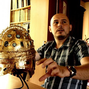 Радован Сремац, археолог (са сајта: по одобрењу носиоца ауторских права